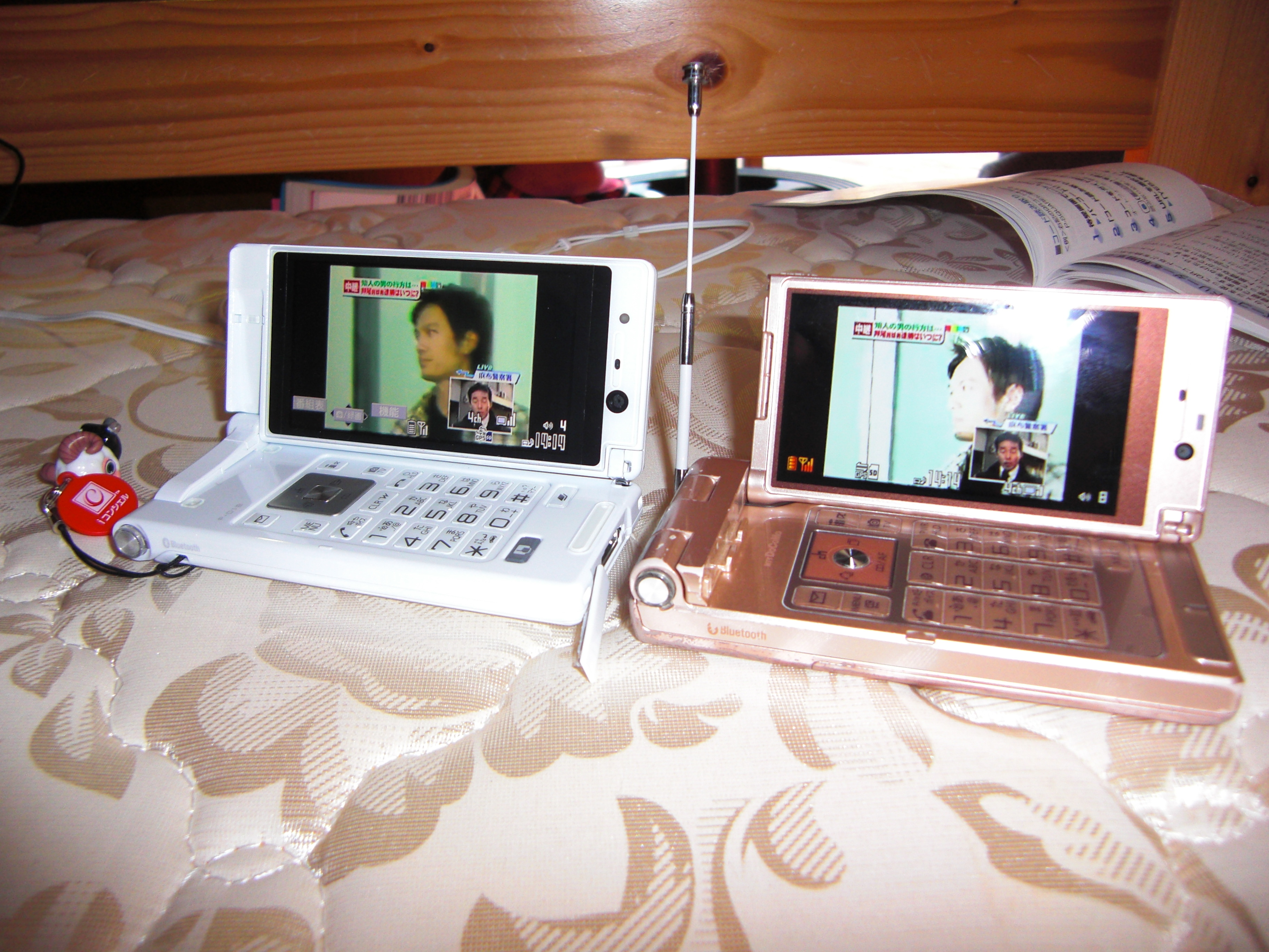 初代VIERAケータイ(P905i)と五代目VIERAケータイ(P-01B)の比較。